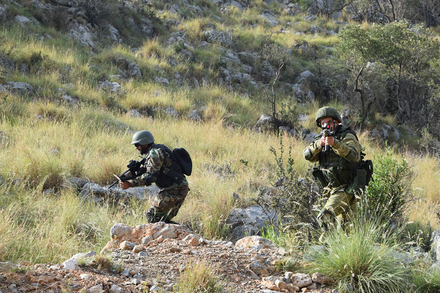 Отработка военнослужащими России и Пакистана совместных разведывательно-диверсионных действий на учении «Дружба-2016»